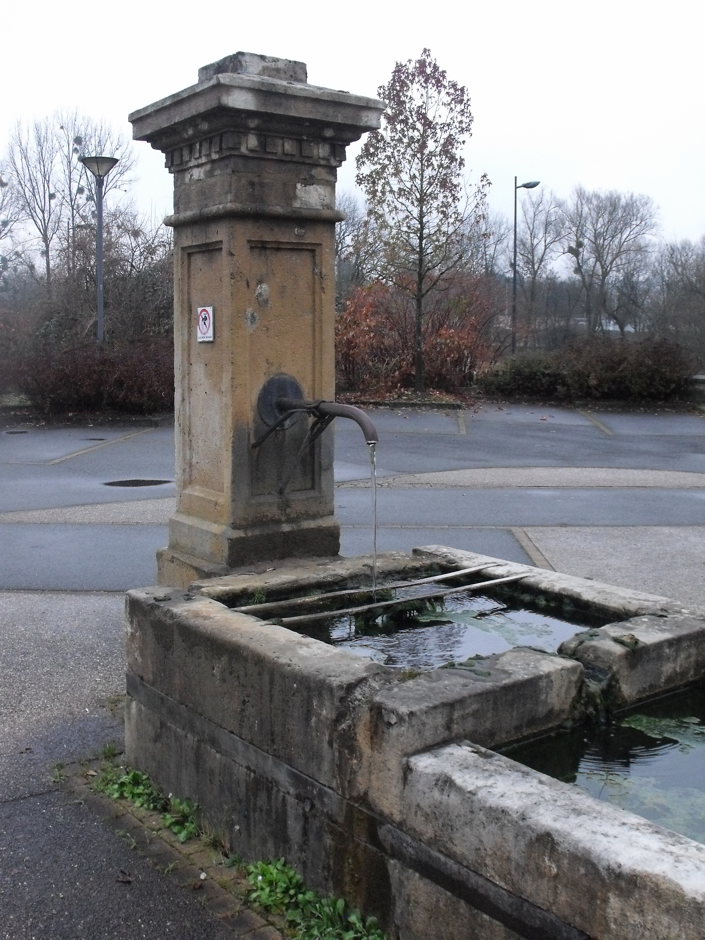 Détail fontaine, Sainte Suzanne (Doubs, France)